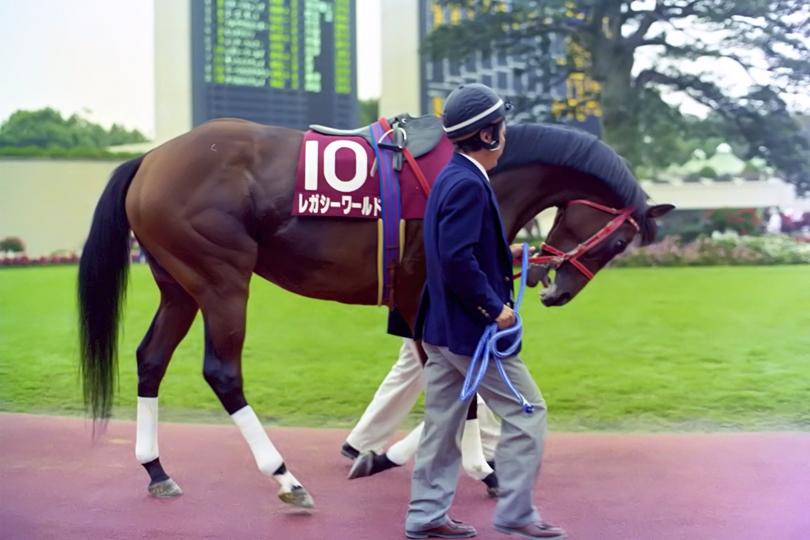 レガシーワールド 1995年10月8日 京都競馬場